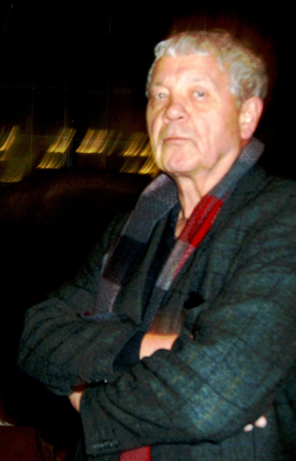 Eckhard Henscheid, Schriftsteller, *1941. Museum König Bonn